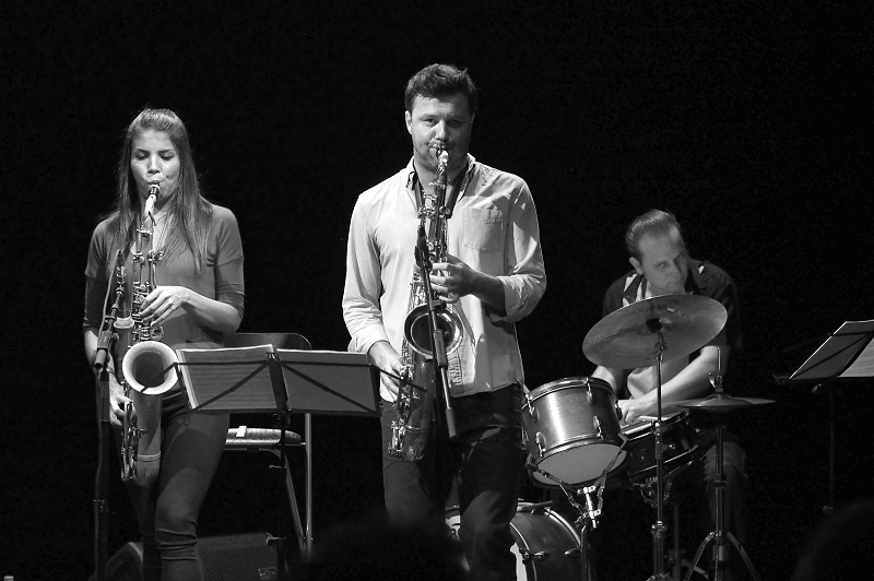 po150818 (34)-800